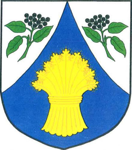 Svídnice (okres Rychnov nad Kněžnou), znak obce